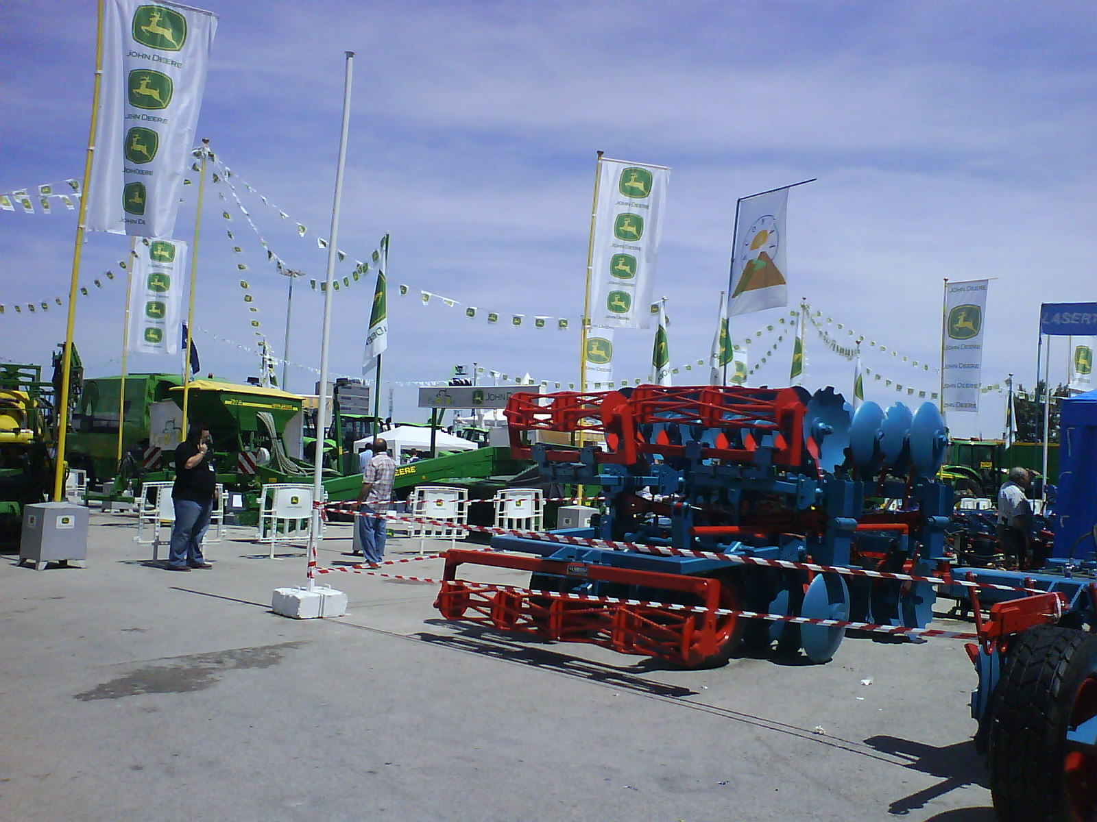 Expositores exteriores en la feria agrícola y ganadera de Castilla-La Mancha "Expovicaman", celebrada en el Palacio del IFAB de Albacete.